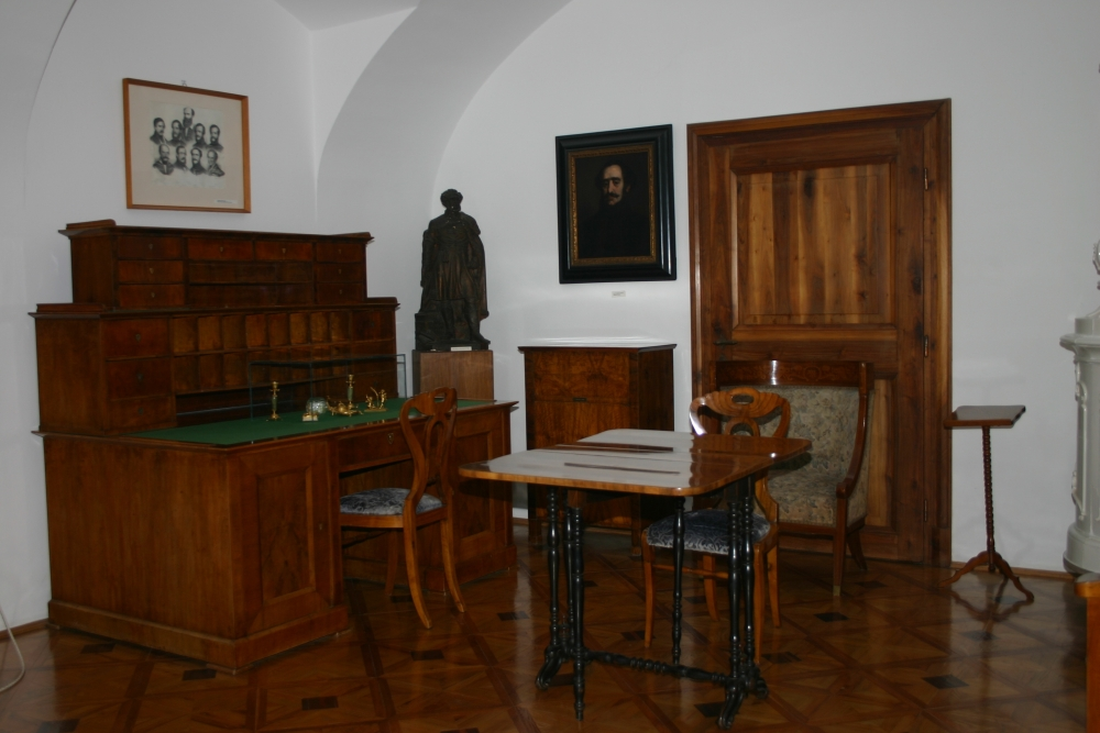 Széchenyi István dolgozószobája a kastélymúzeumban, Nagycenk, Győr-Moson-Sopron megye